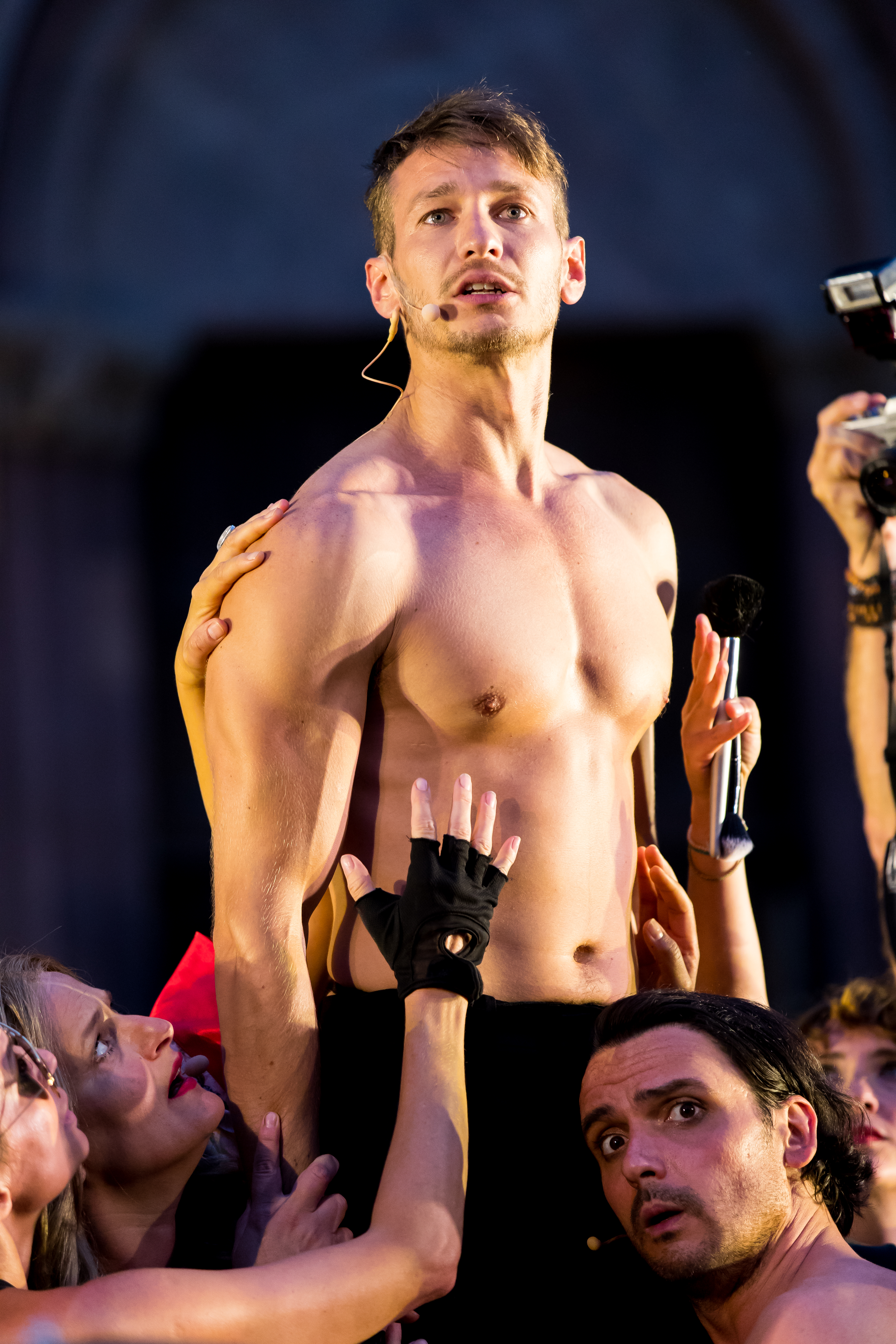 2016: Uraufführung: "GOLD. Der Film der Nibelungen" Regie: Nuran David Calis Autor: Albert Ostermaier Intendant: Nico Hofmann --- Ensemble: Produzent Konstantin Trauer: Uwe Ochsenknecht Regisseur Arsenij Kubik: Vladimir Burlakov Drehbuchautor Charlie P. Weide: Josef Ostendorf Society Reporter Peter Scheumer: Dominic Raacke Kamerafrau "the eye": Anna Rot Setdesignerin "set": Joy Maria Bai Assistentin des Produzenten Carmen: Alexandra Kamp Maskenbildnerin Sueyla Blume : Ayse Bosse die Ältere Kriemhild Karina Bergmann: Katja Weitzenböck die Jüngere Kriemhild Simone Gehel: Constanze Wächter die Ältere Brünhild Lotte Jünger: Michaela Steiger die Jüngere Brünhild Nathalie Aurun: Dennenesch Zoudé Siegfried Mohamad Söder: Ismail Deniz Hagen René Inner: Sascha Göpel Gunther Klaus Castel: Maximilian Laprell Bürgermeister Franz Koppoler: Heiner Lauterbach during Nibelungenfestspiele "GOLD. Der Film der Nibelungen" at Wormser Kaiserdom, Worms, Rheinland Pfalz, Germany on 2016-07-12, Photo: Sven Mandel